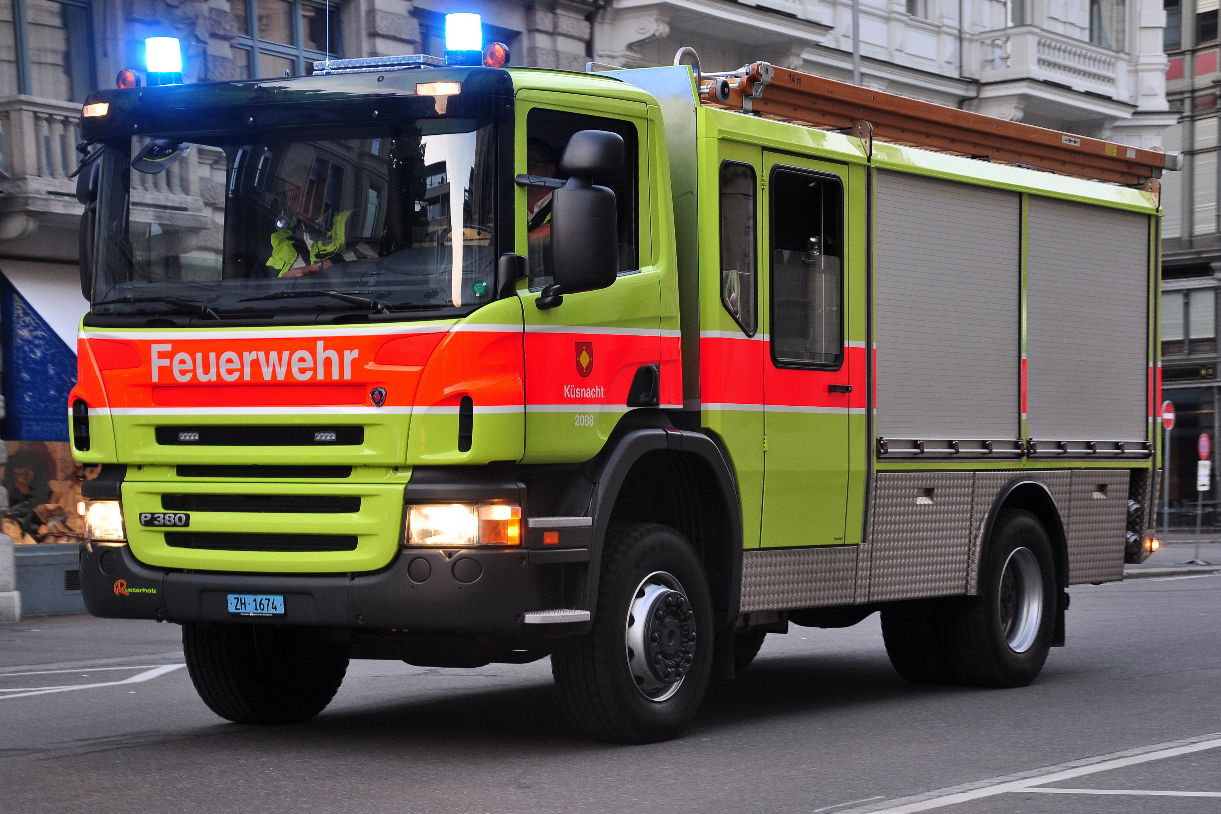 10 Jahre SRZ Jubiläumsanlass (13. und 14. Mai 2011) von Schutz & Rettung, Oldtimertreffen von Feuerwehrfahrzeugen der umliegenden Stadtgemeinden auf dem Münsterhof respektive Fahrzeugumzug (Bahnhofstrasse) in Zürich (Switzerland)